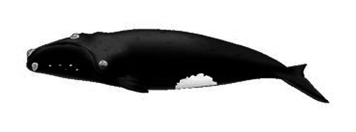 La ballena franca glacial o ballena de los vascos (Eubalaena glacialis) es una especie de cetáceos del suborden Mysticeti, pertenecientes al género Eubalaena. Se extiende por el Atlántico norte.